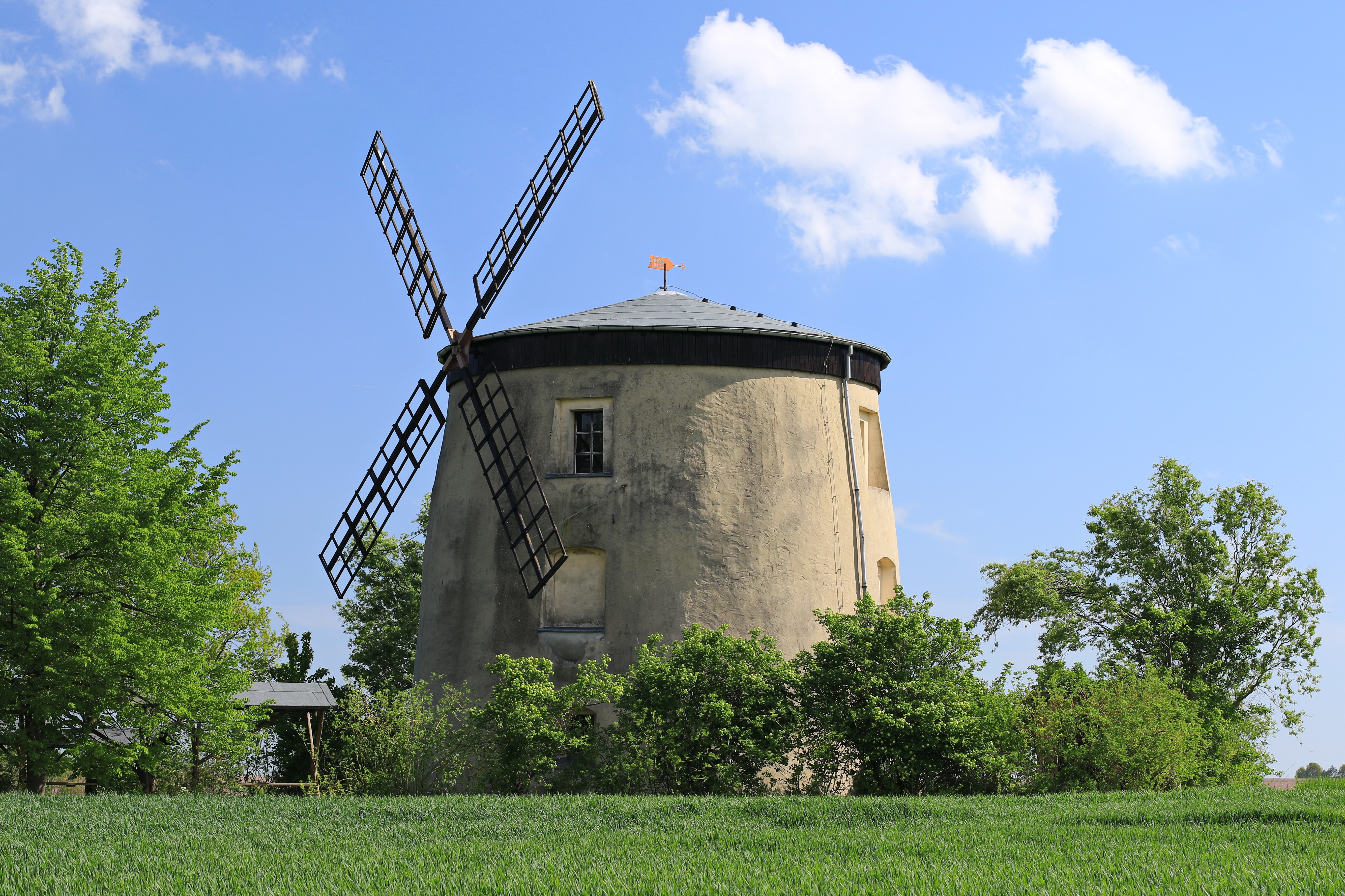 Windmühle Tettau , Gemeinde Schönberg, Kreis Zwickau in Sachsen.